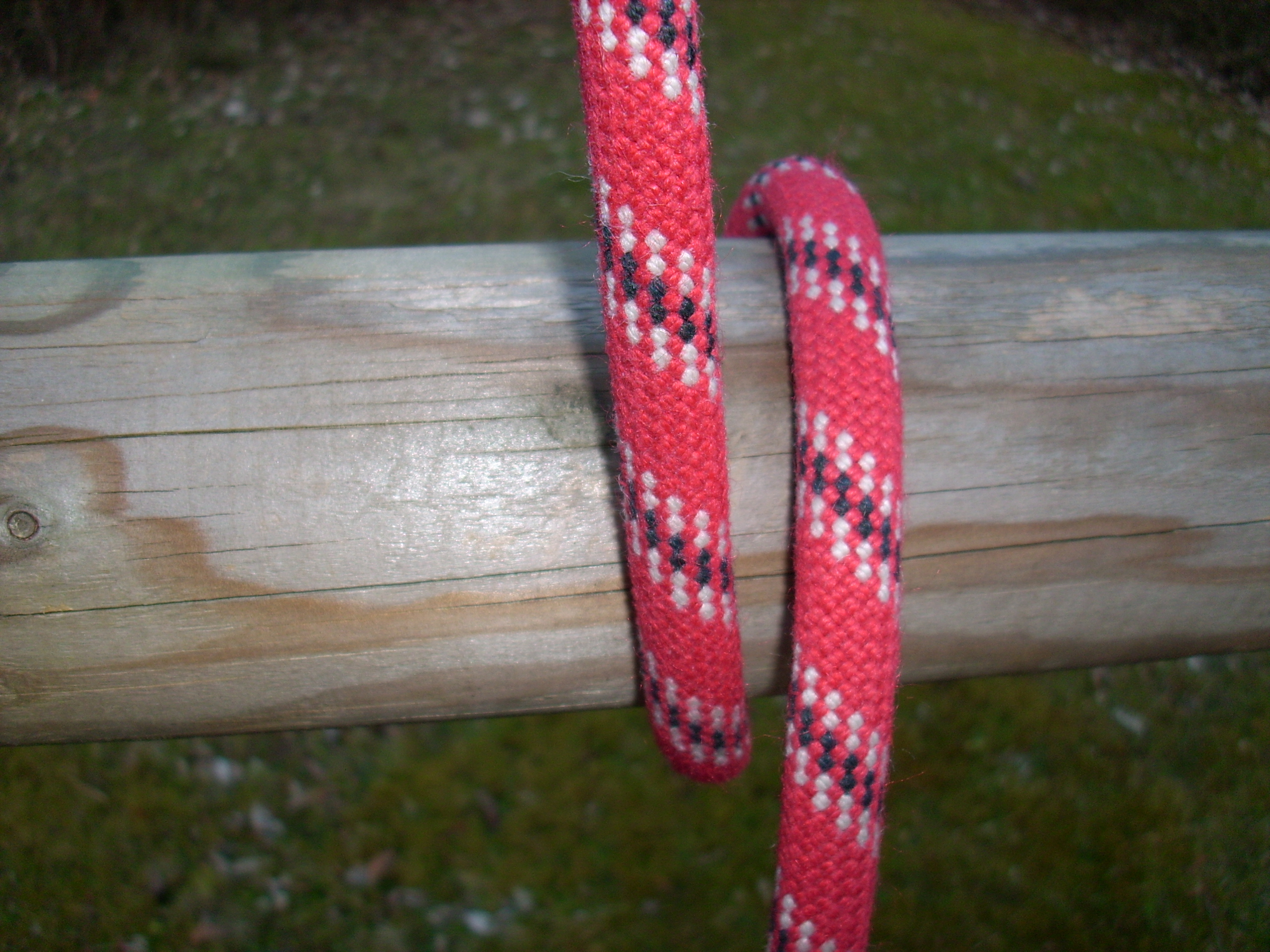 ein Törn